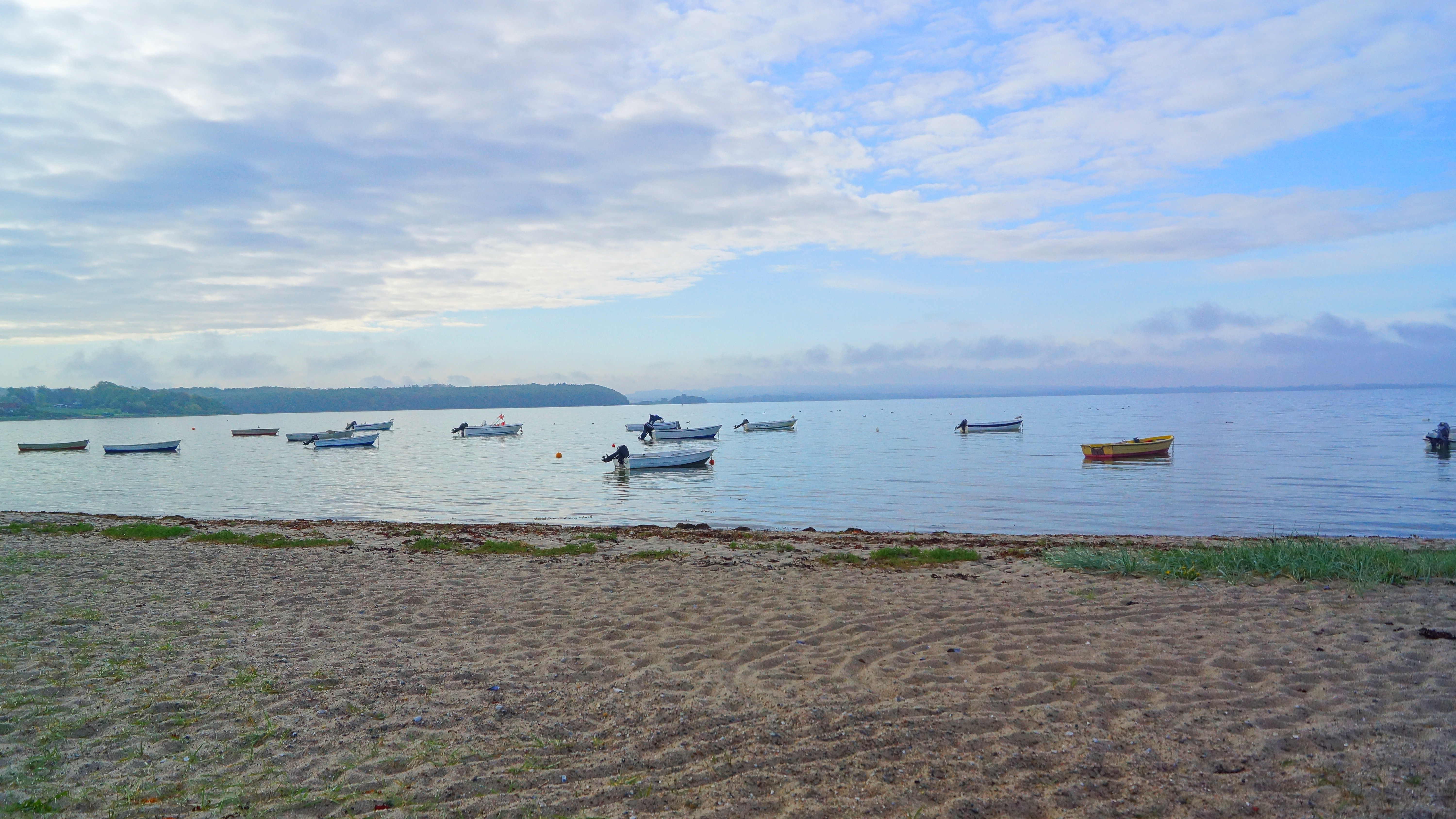 Følle Strand